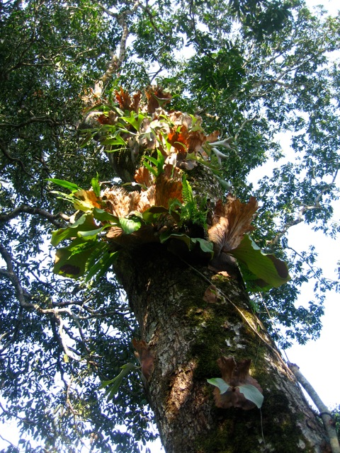 Fougères épiphytes (Platycerium angolense et Platycerium stemaria) sur tronc de Sipo (Entandrophragma utile)